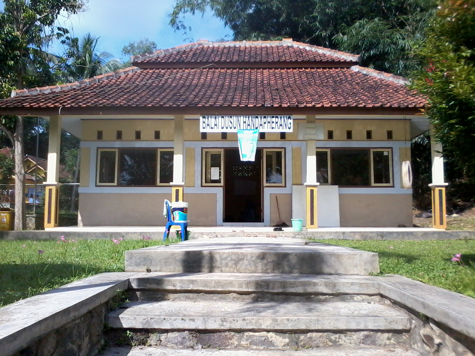 Balai Dusun Handapherang, Desa Handapherang, Kecamatan Cijeungjing, Kabupaten Ciamis, Provinsi Jawa Barat, Indonesia